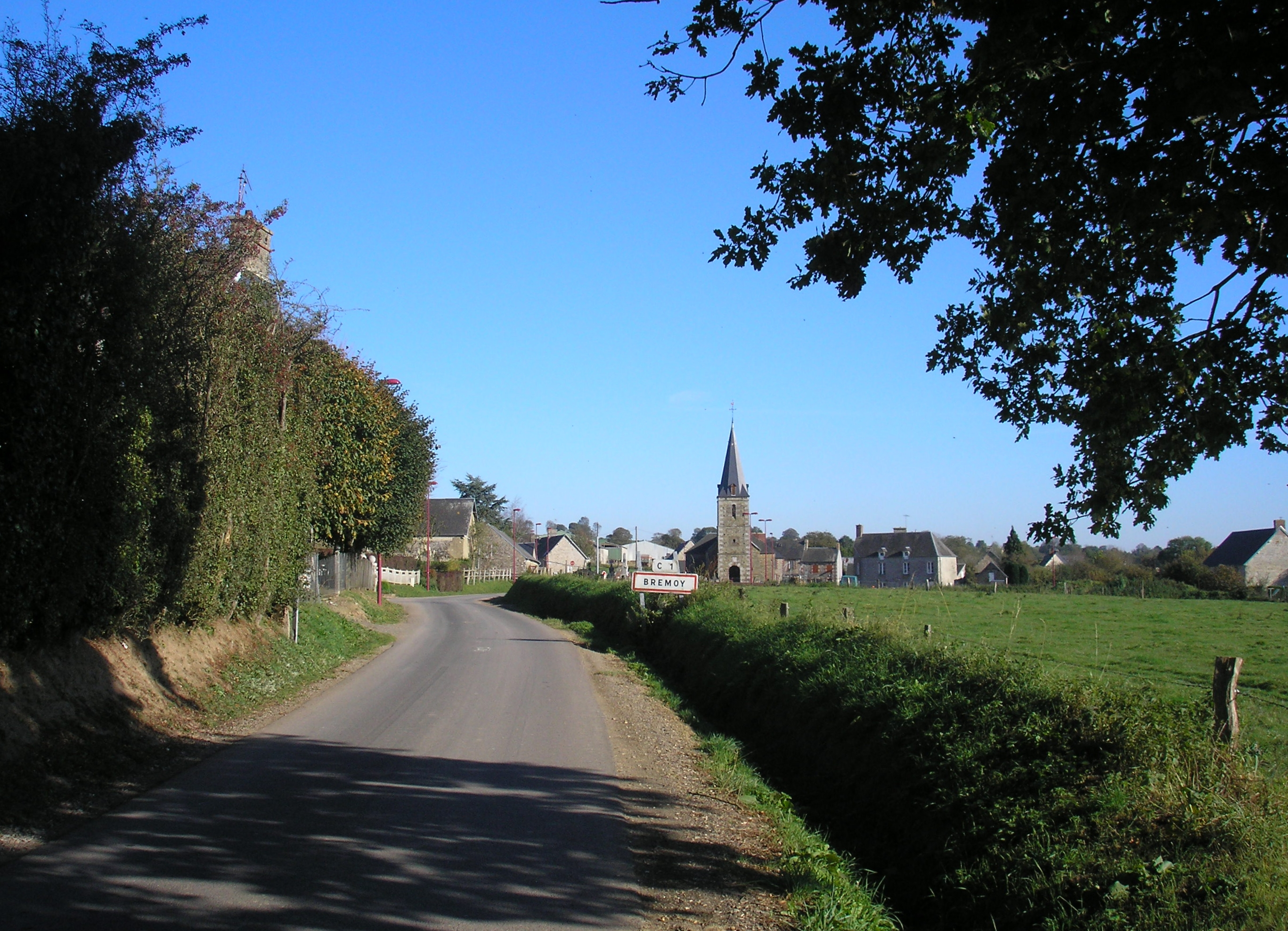 Brémoy (Normandie, France). L'entrée ouest du bourg.